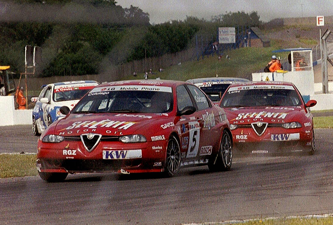 Roberto Colciago & Nicola Larini - Alfa Romeo 156 GTA leads Rickard Rydell - Volvo S60 & Andre Couto - Honda Civic Type-R